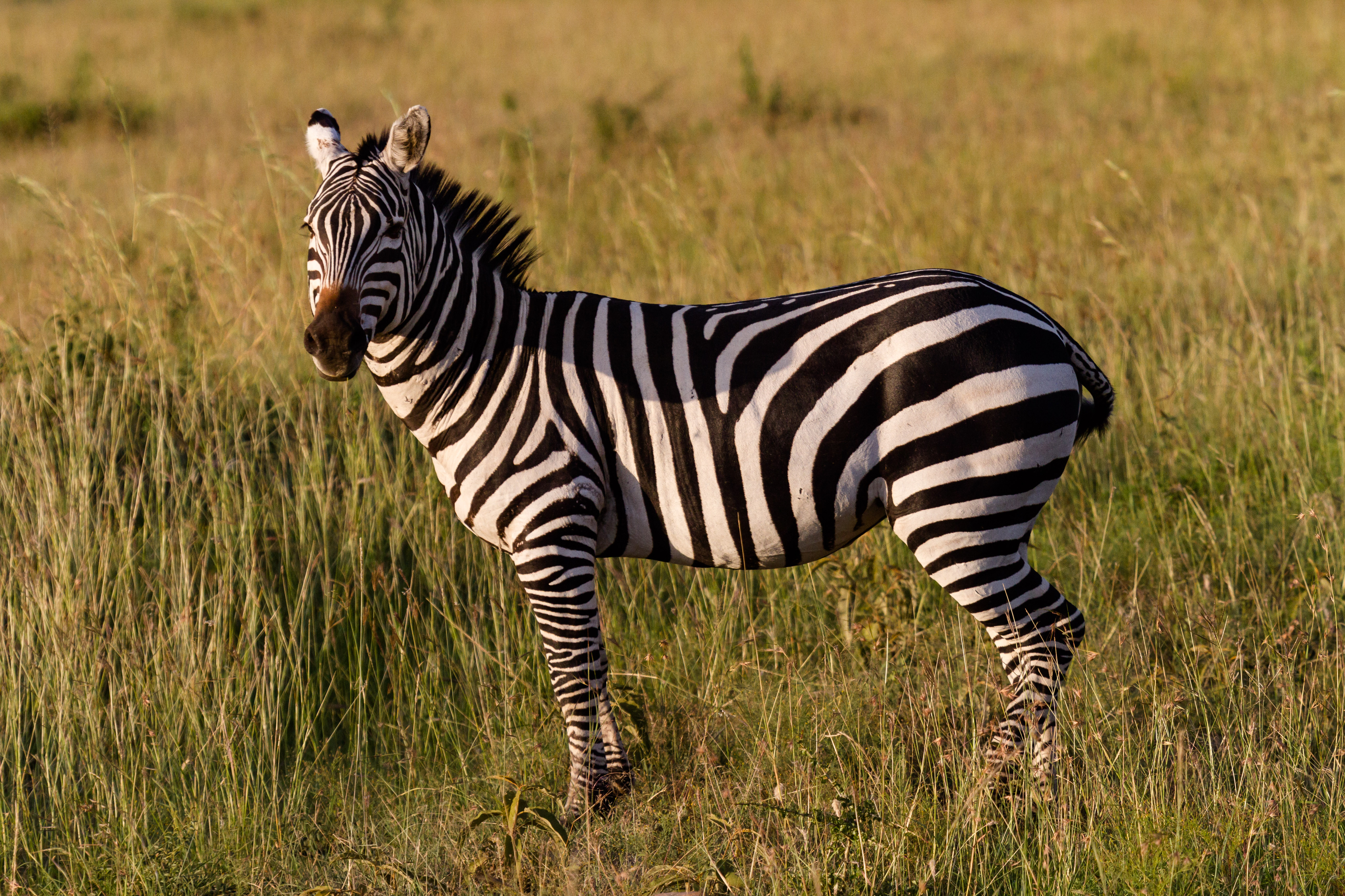 Zebra posing for me in Masai Mara national park.